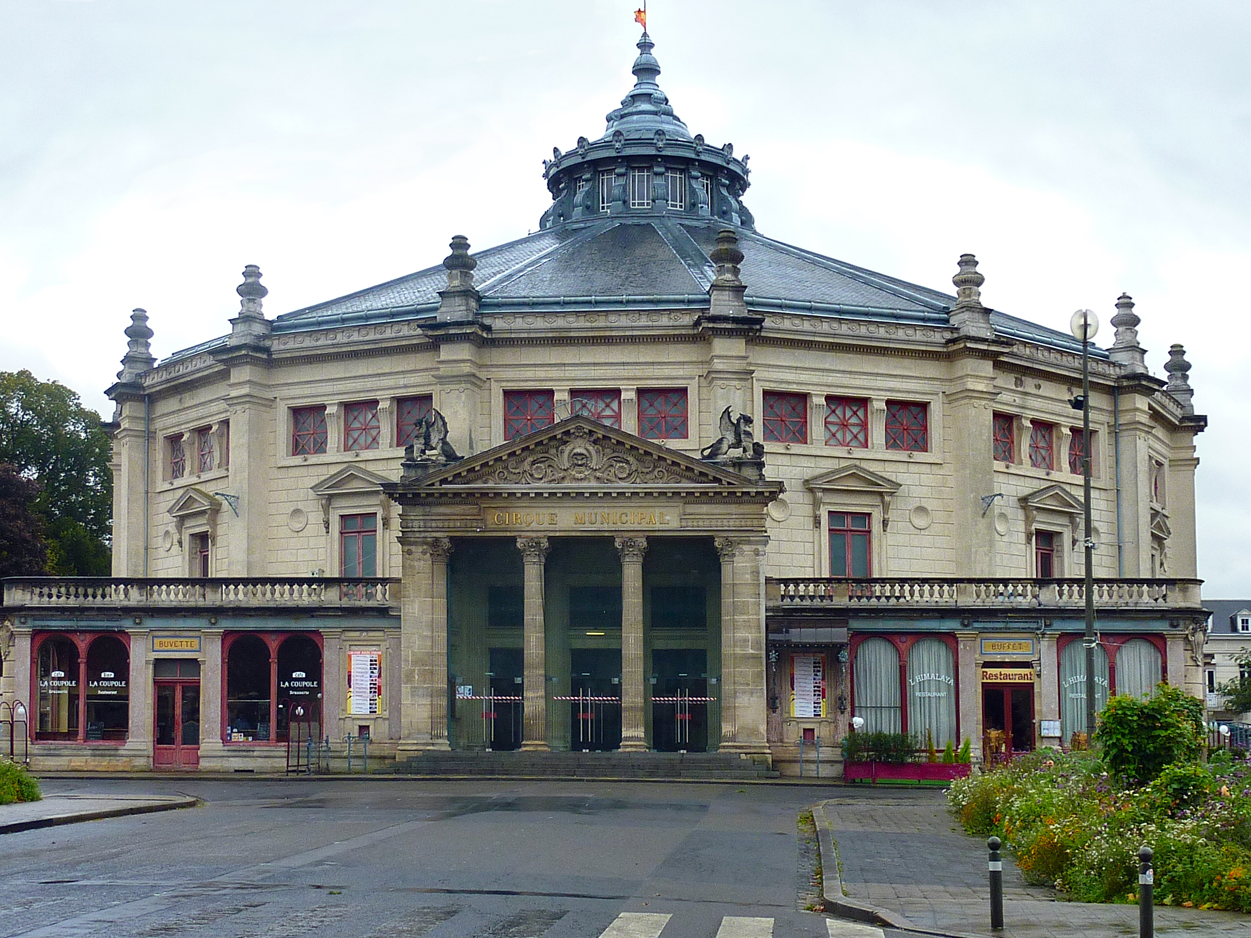 Cirque municipal Jules Verne Amiens Somme France